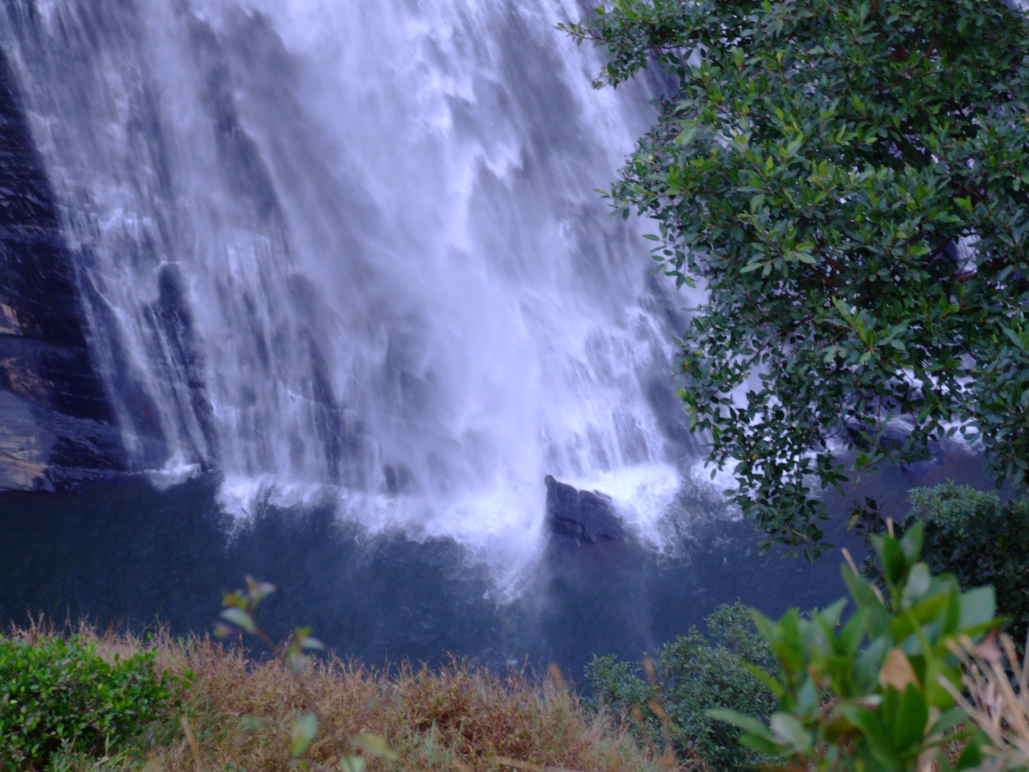 ಕನ್ನಡ: ಉಂಚಳ್ಳಿ ಜಲಪಾತ,ಉತ್ತರ ಕನ್ನಡ